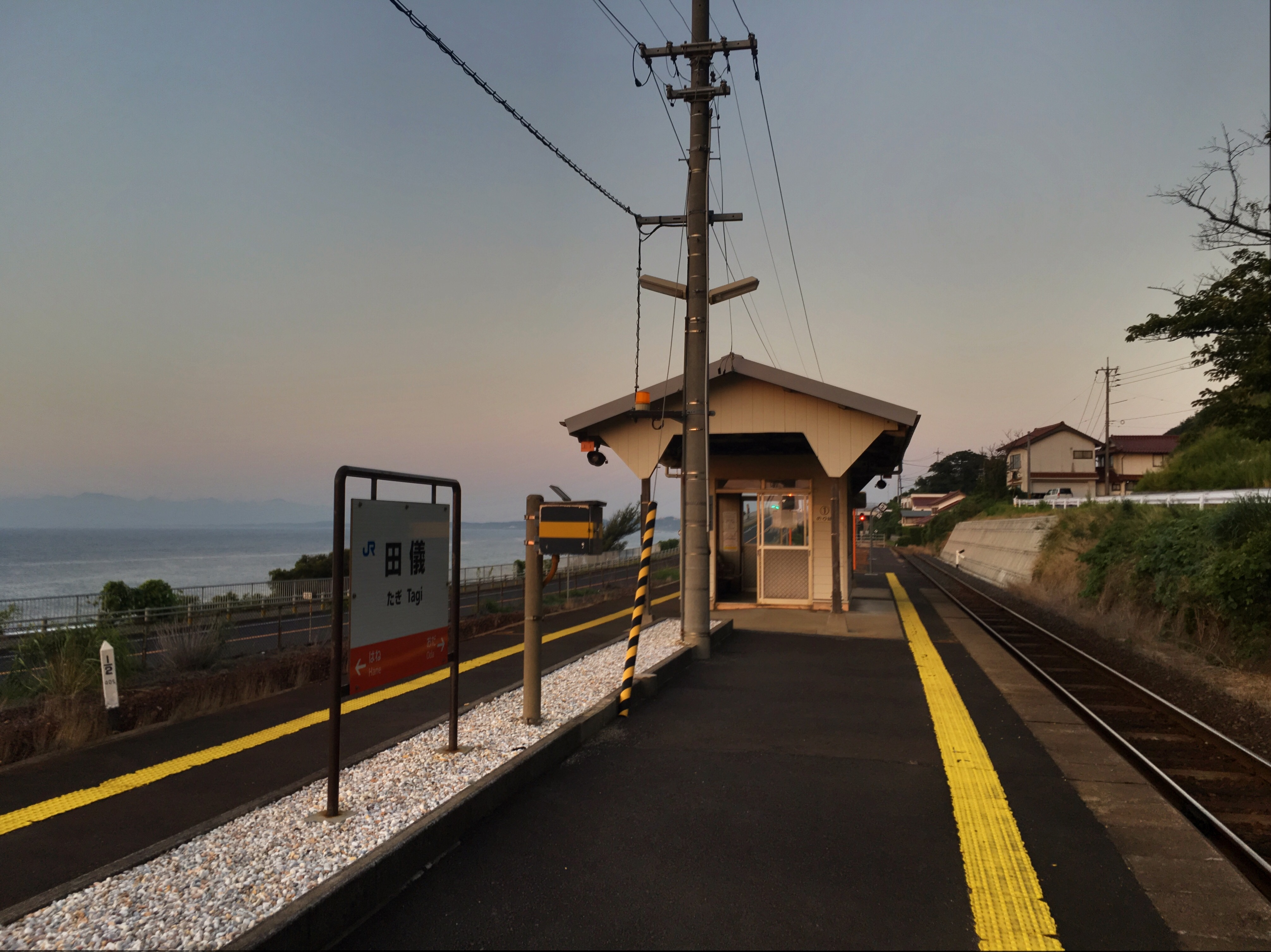 Tagi Station (田儀駅)